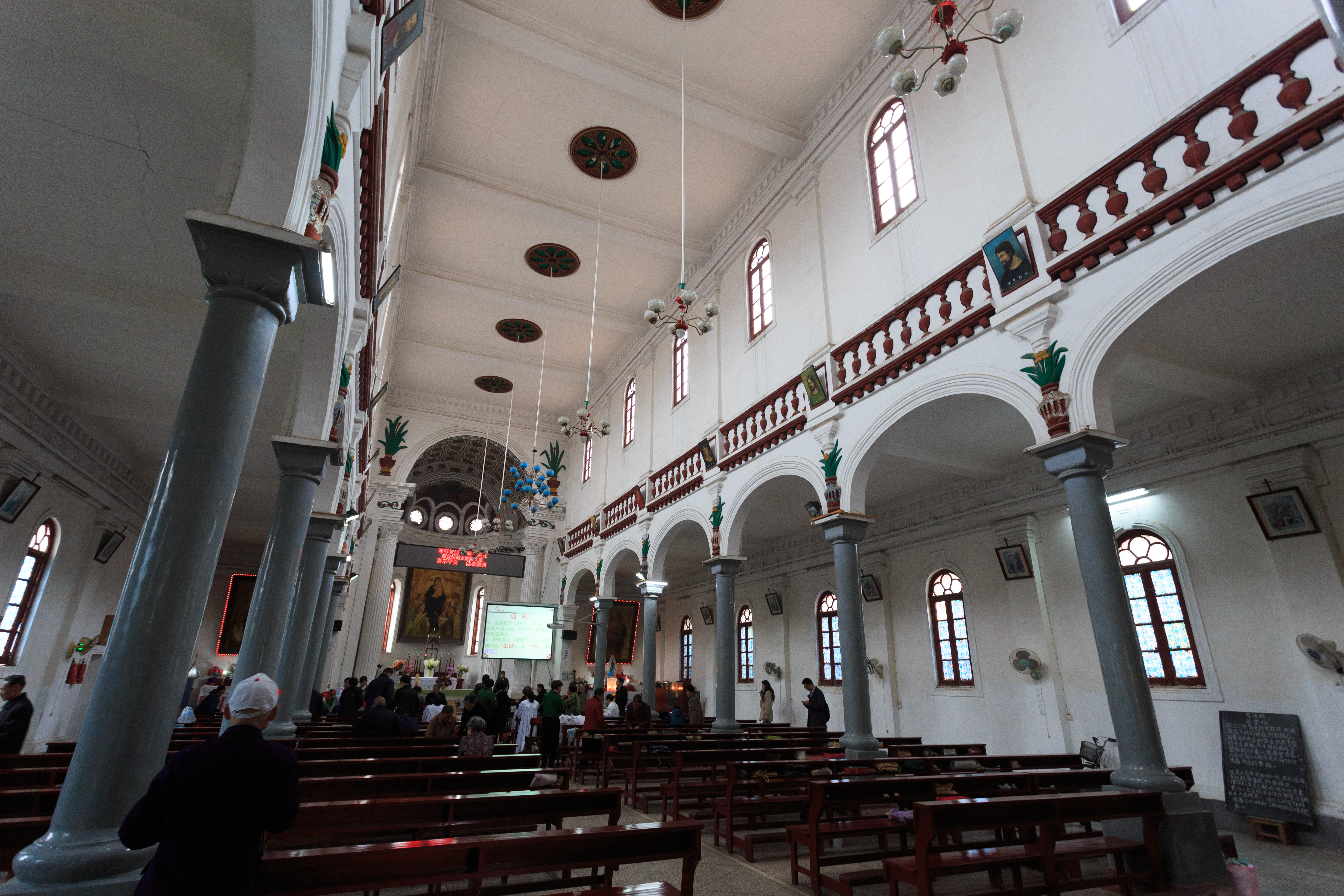 荆州南门天主教堂—— 内部